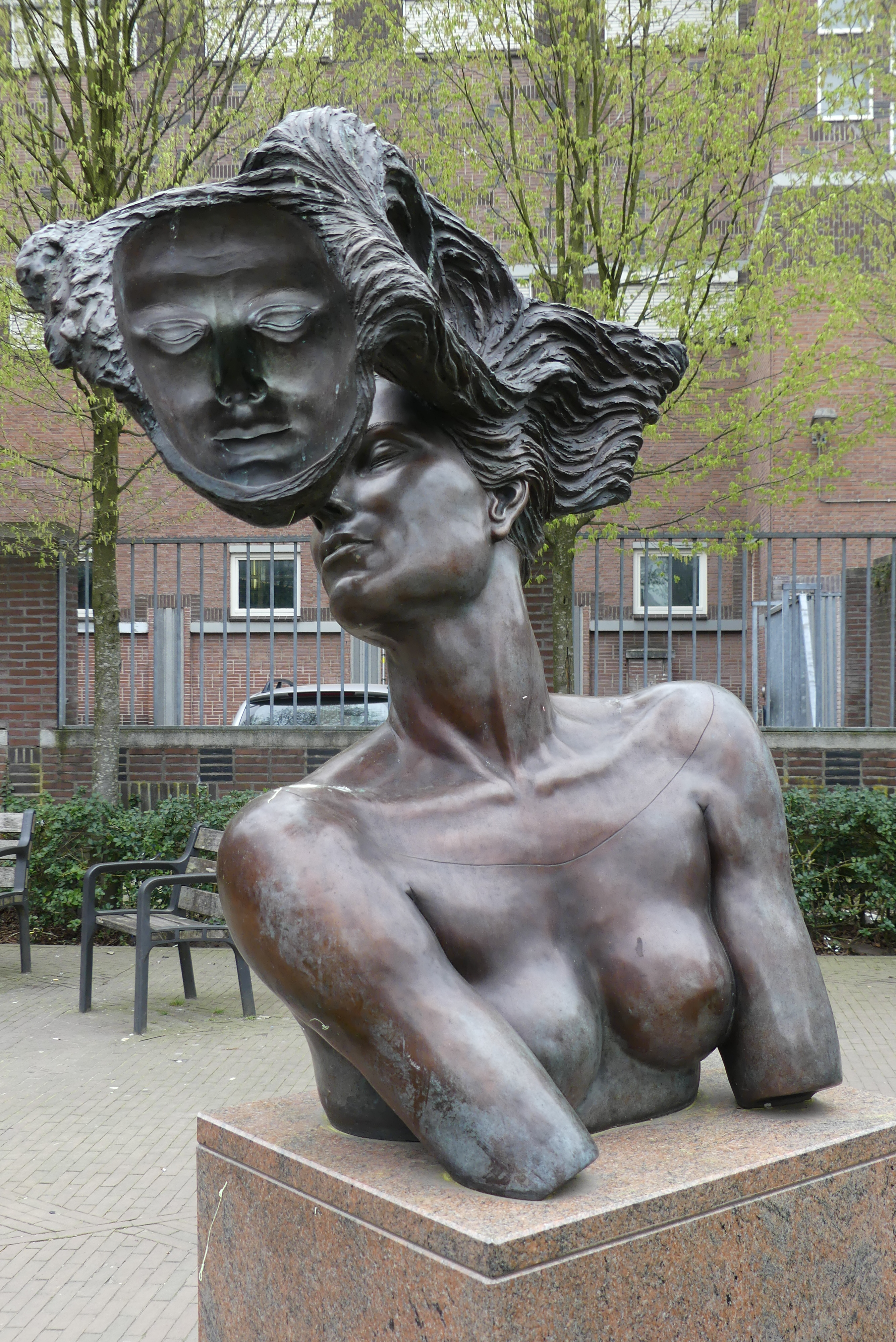 Zicht op het beeldhouwwerk Verbondenheid Amina Aminus van Margo Homan 2013 in de Helga Deentuin in Tilburg